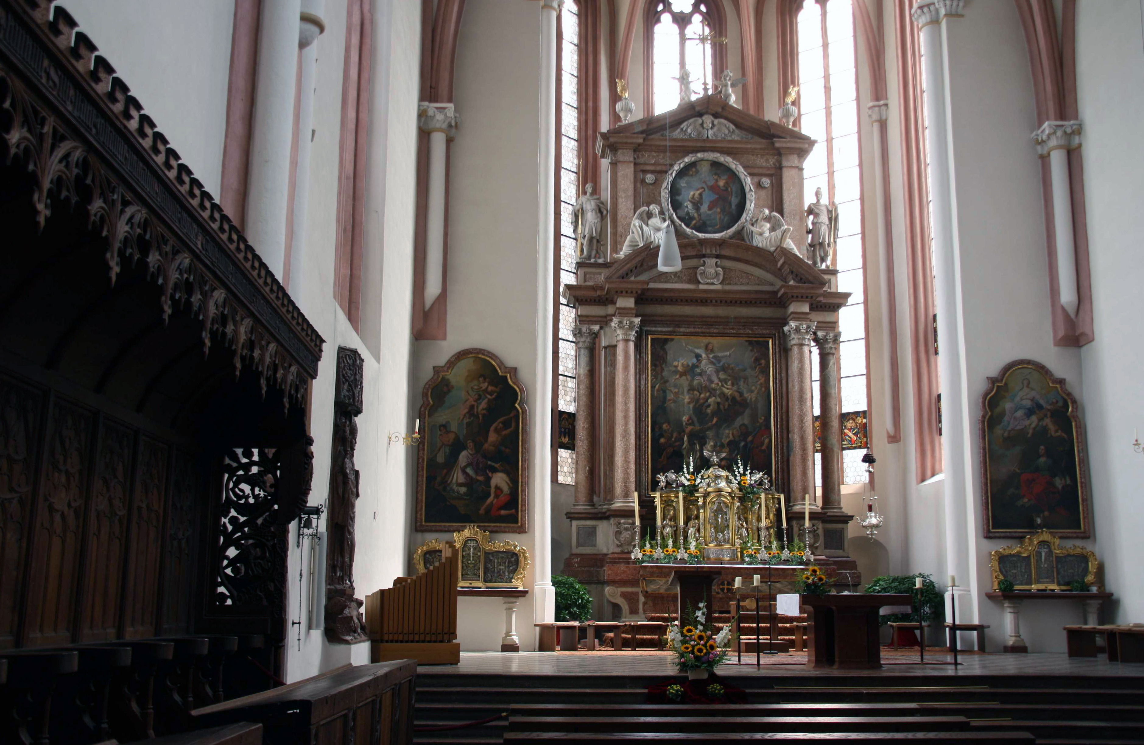 Das Innere der Stiftskirche von Berchtesgaden